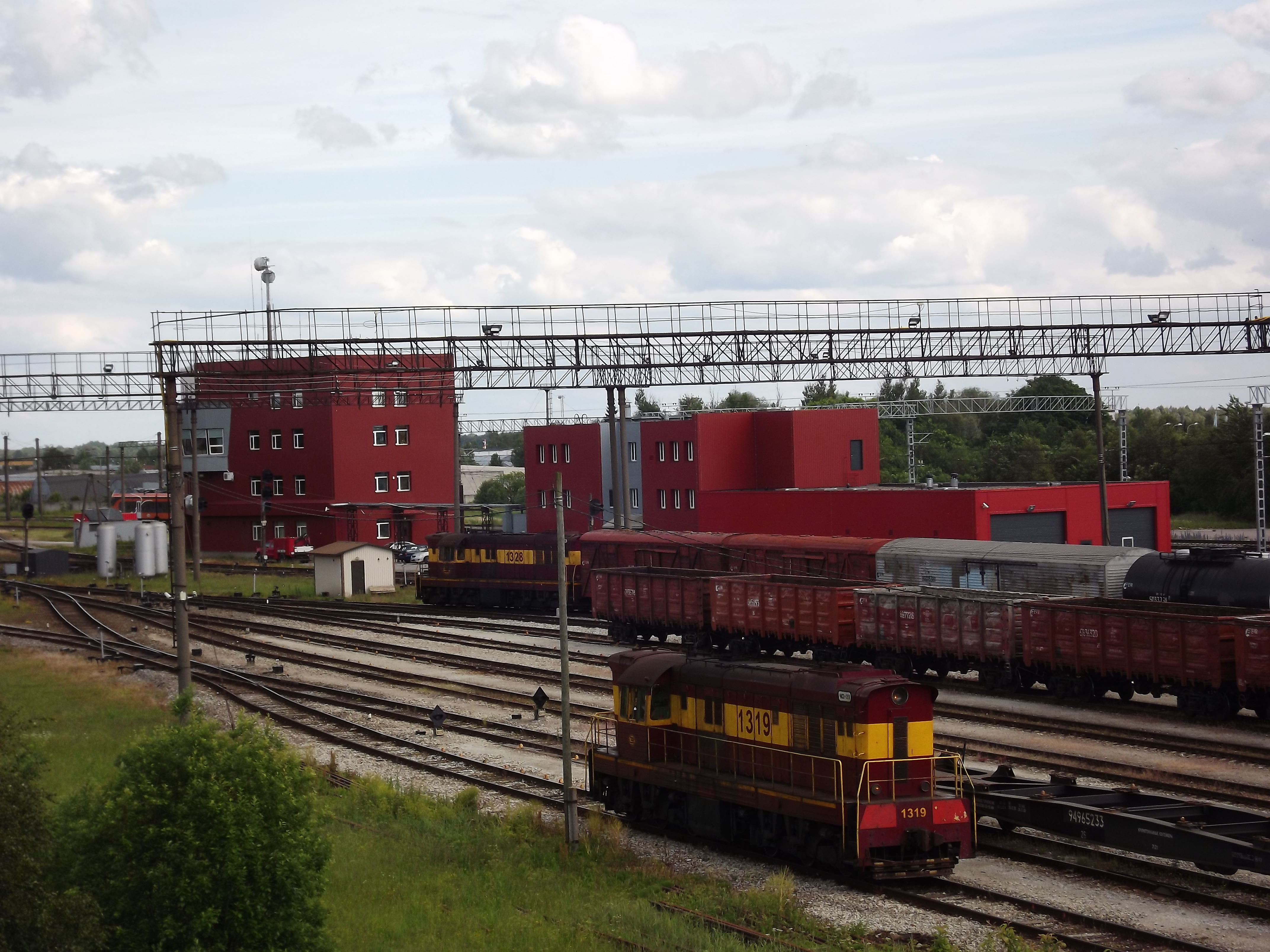 Ülemiste kaubajaam, esiplaanil manöövervedur ChME3.